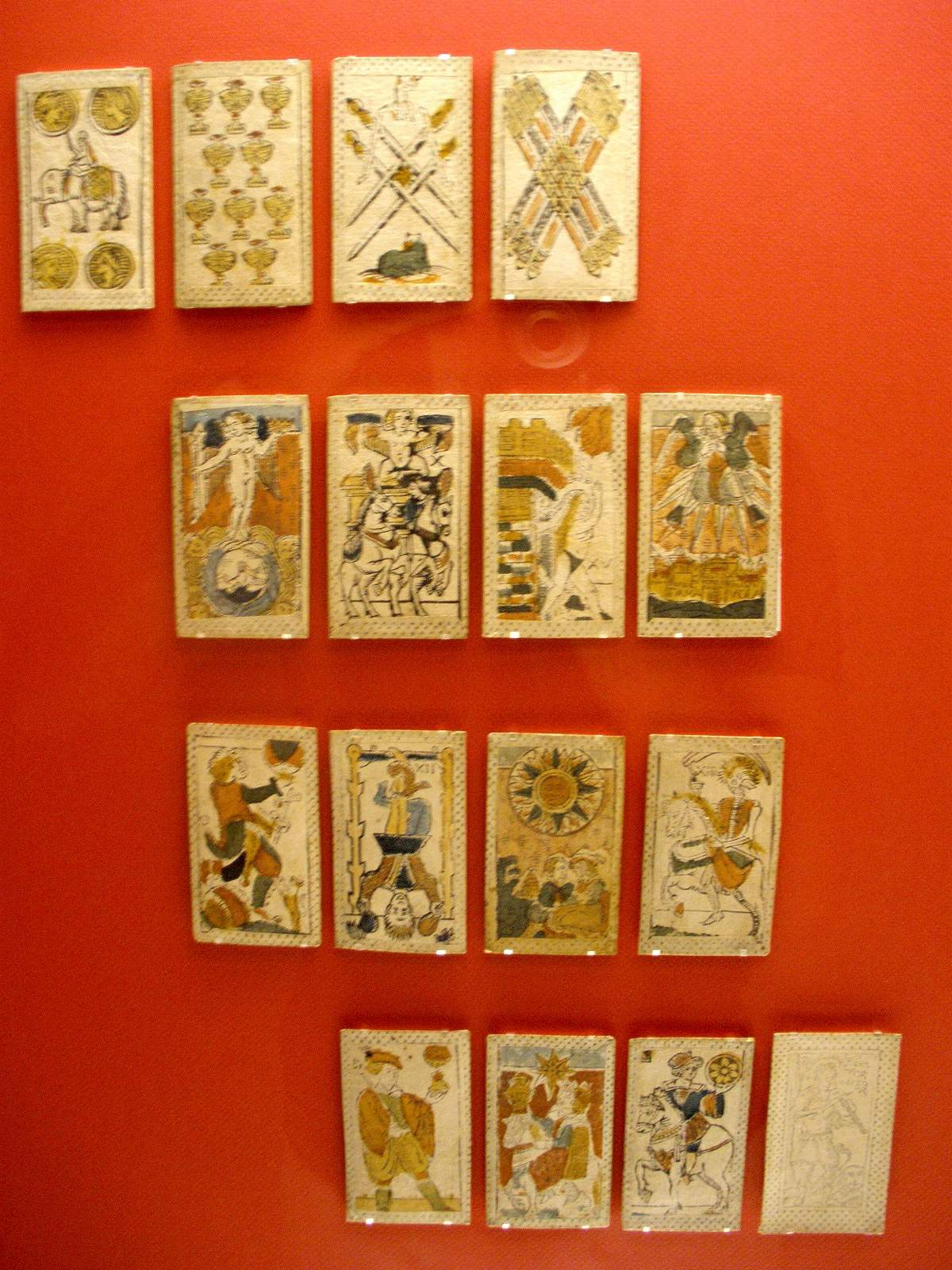 Bibat Museo Fournier de Naipes de Álava (Vitoria-Gasteiz)